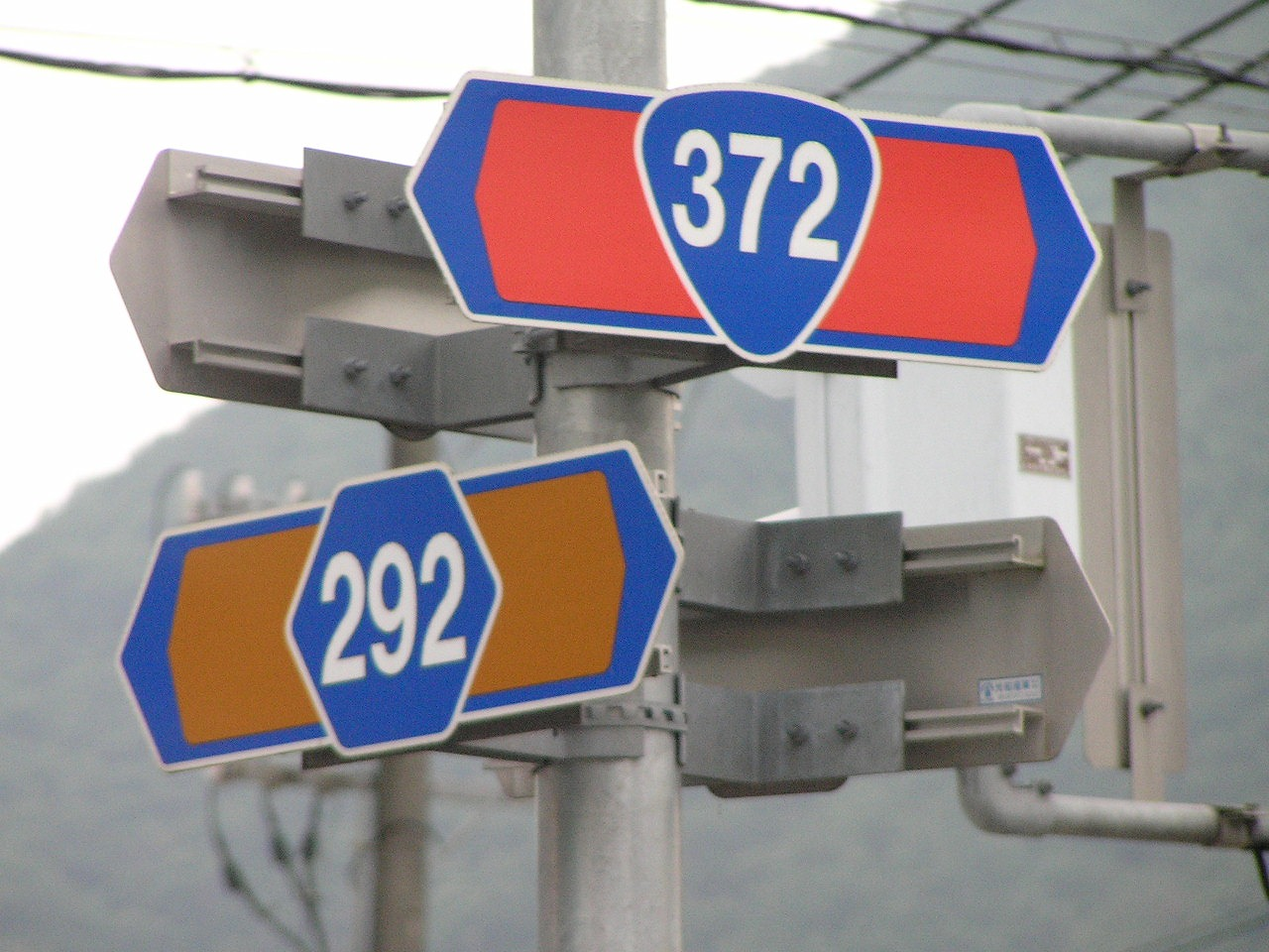 国道372号線